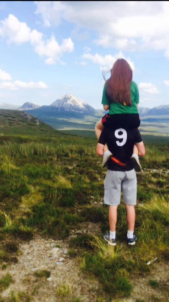 An radharc ag barr na muilte gaoithe i gCrollí, Dhún na nGall